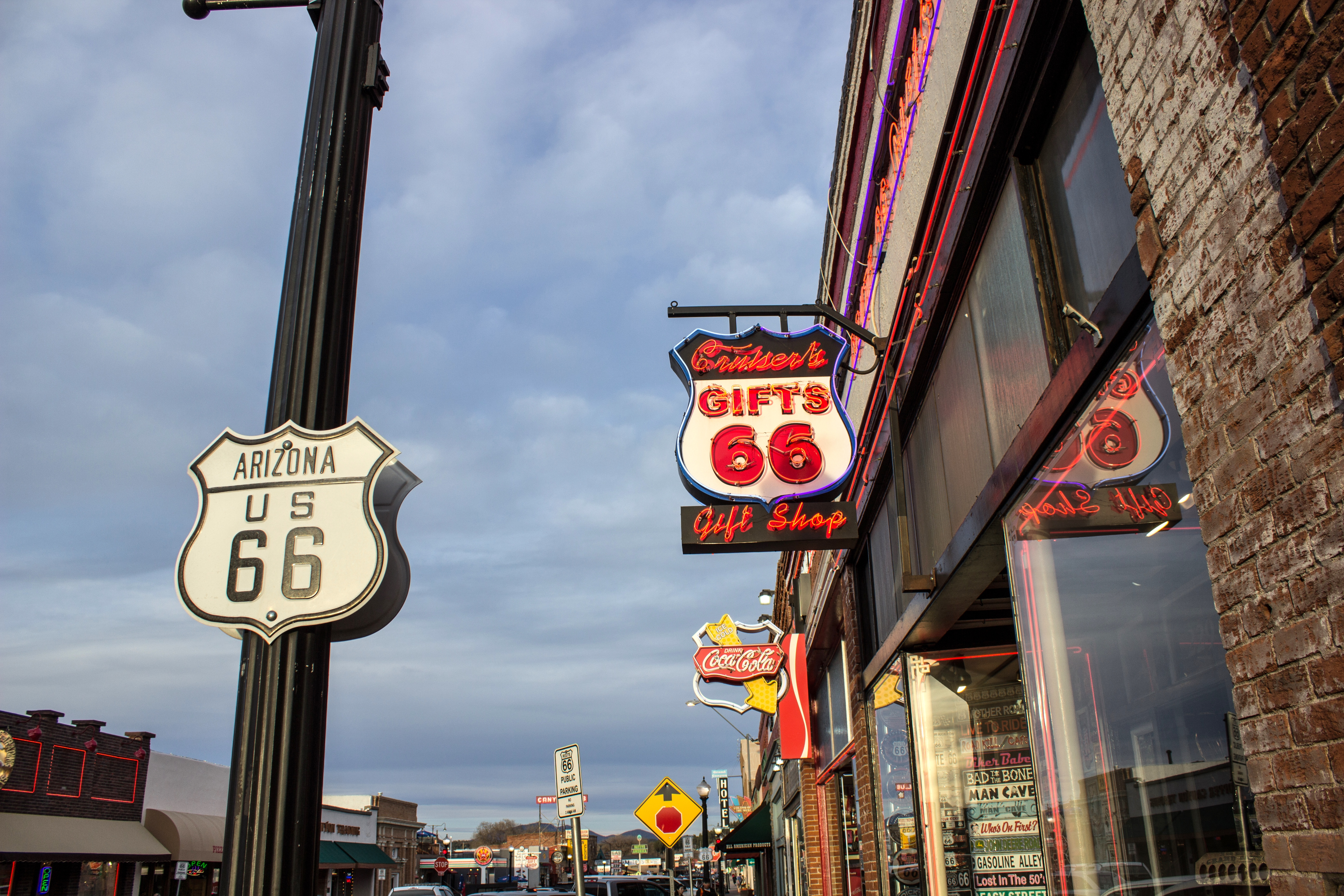 Williams, Arizona.